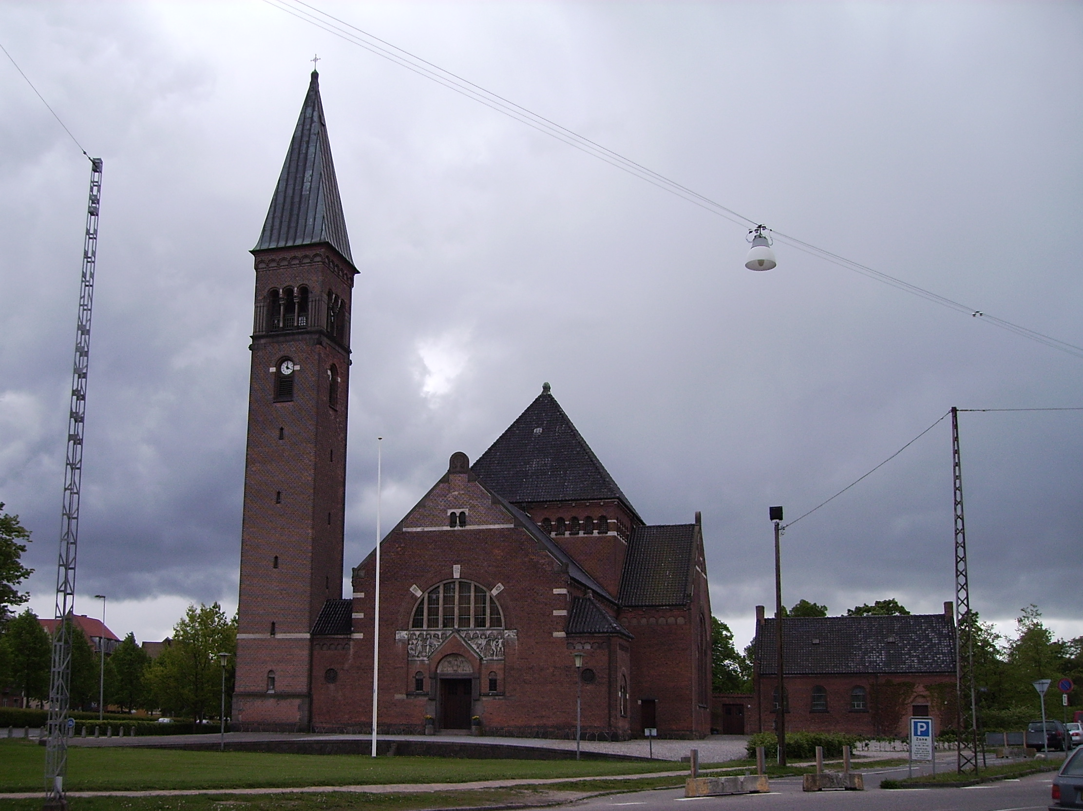 Ansgars Kirke, Ansgars Sogn, Odense Herred, Odense Amt, Denmark (Danish Church) Date: 30.05.2006 Photographed by Søren Møller